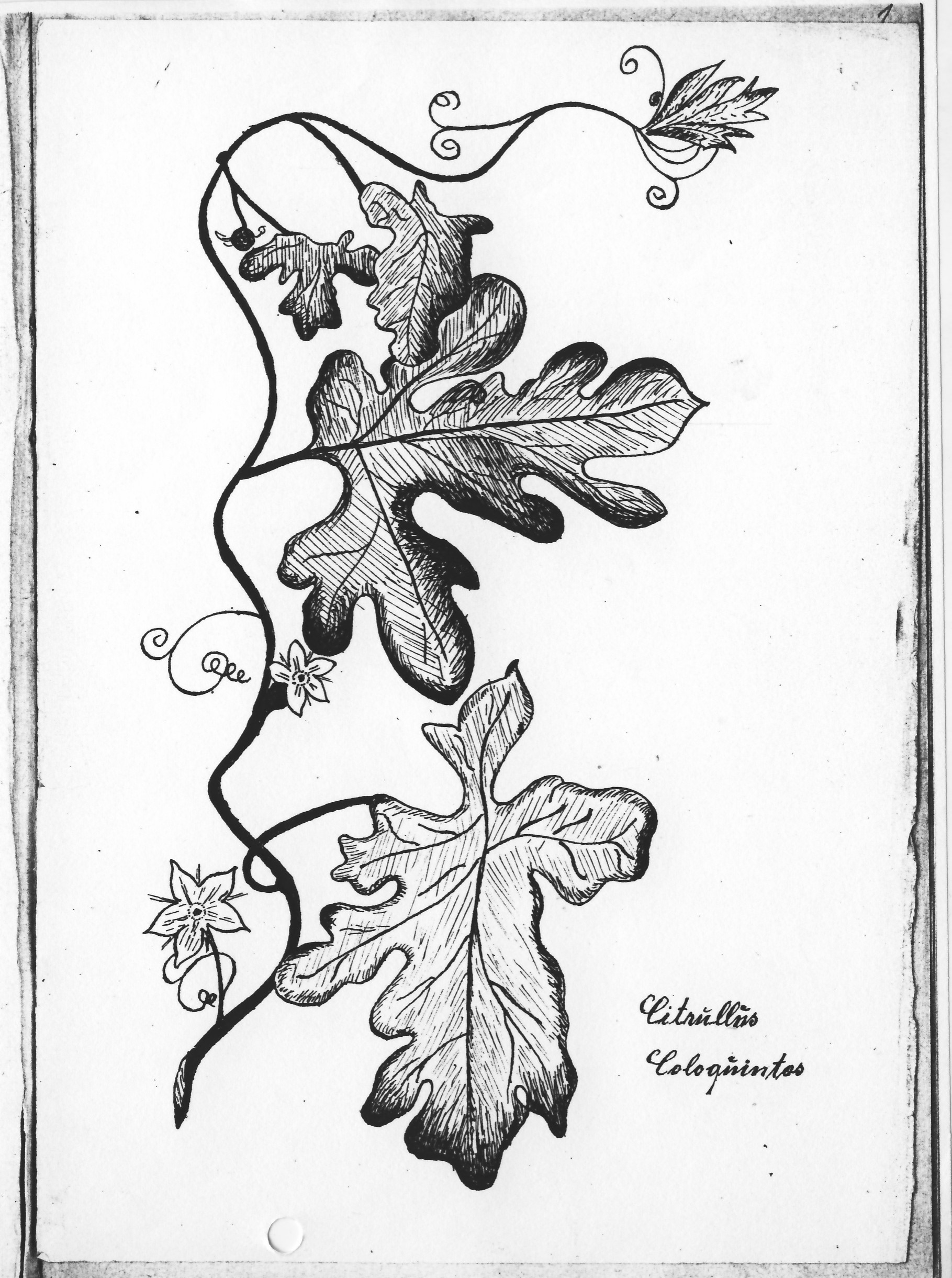 Blattskizze